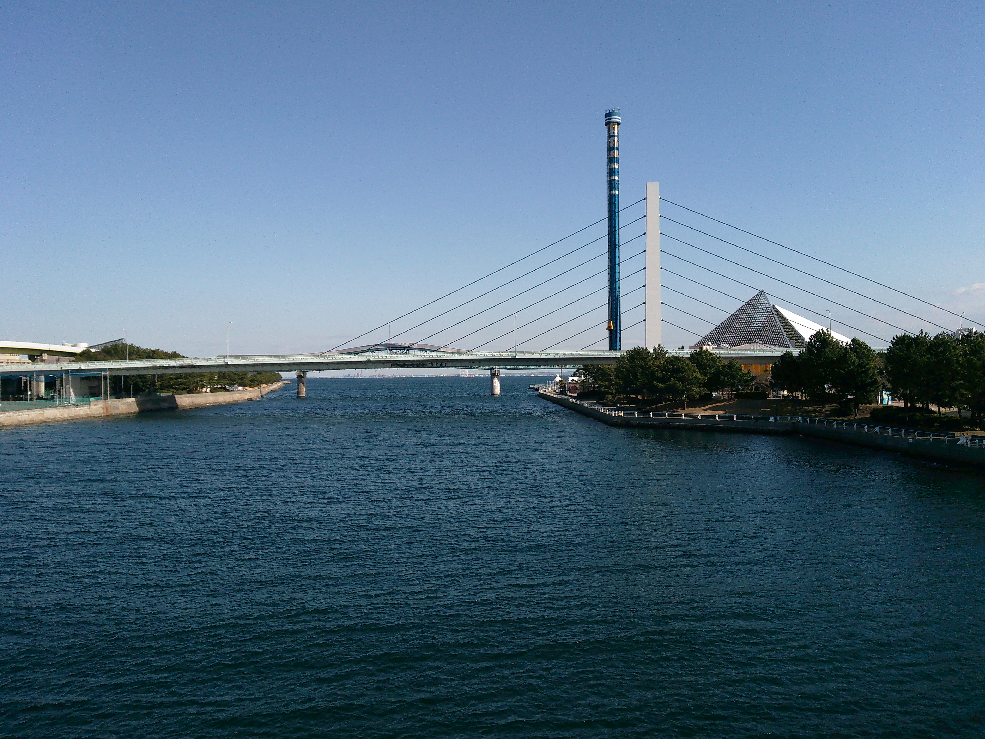 横浜市金沢区。福浦と八景島を結ぶ、国道357号の柴航路橋